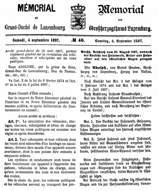 Luxemboiurg: Arrêté grand-ducal du 28 août 1897 portant règlement général sur la circulation des véhicules, cavaliers et vélocipèdes sur les voies publiques.